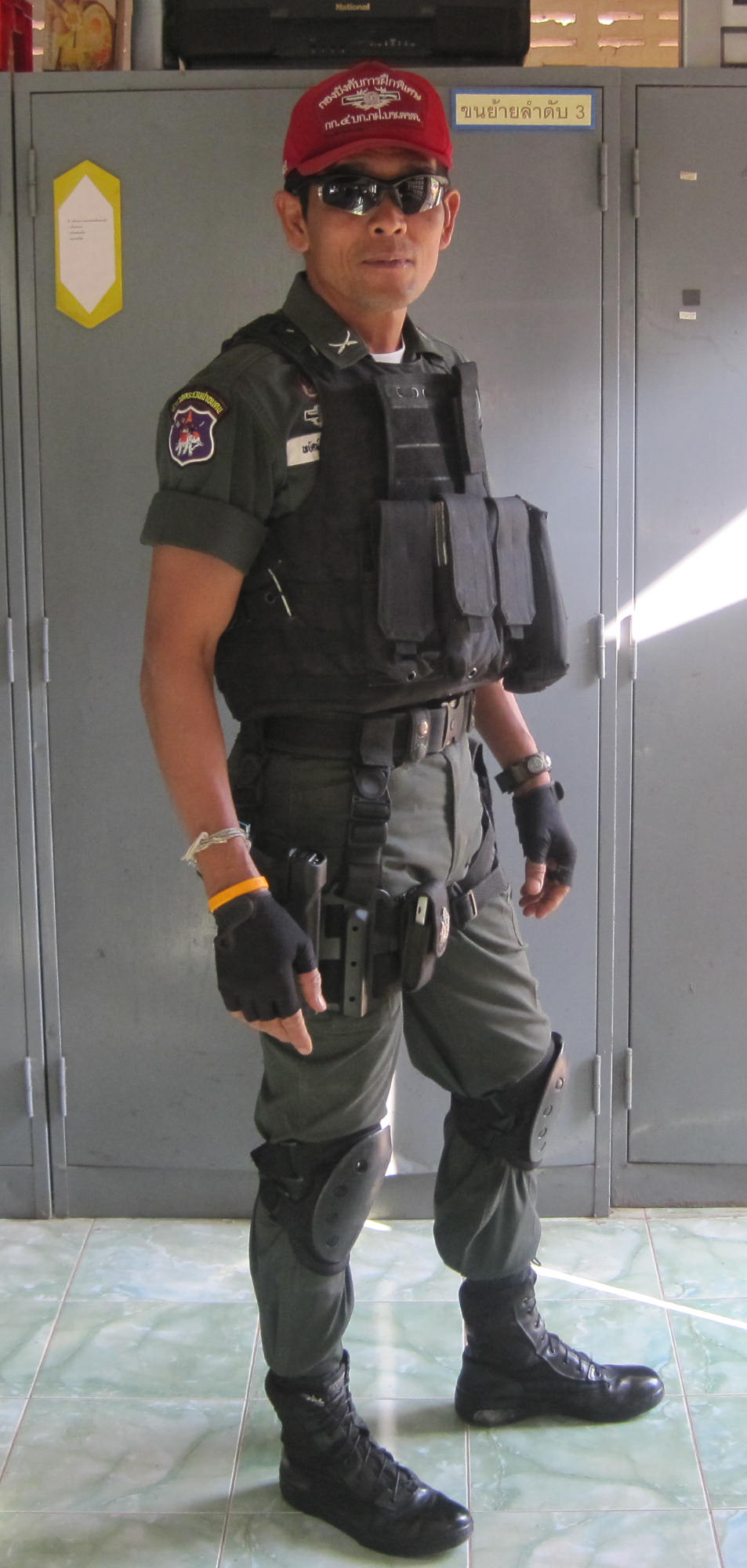 การยิงปืนทางยุทธวิธี๑